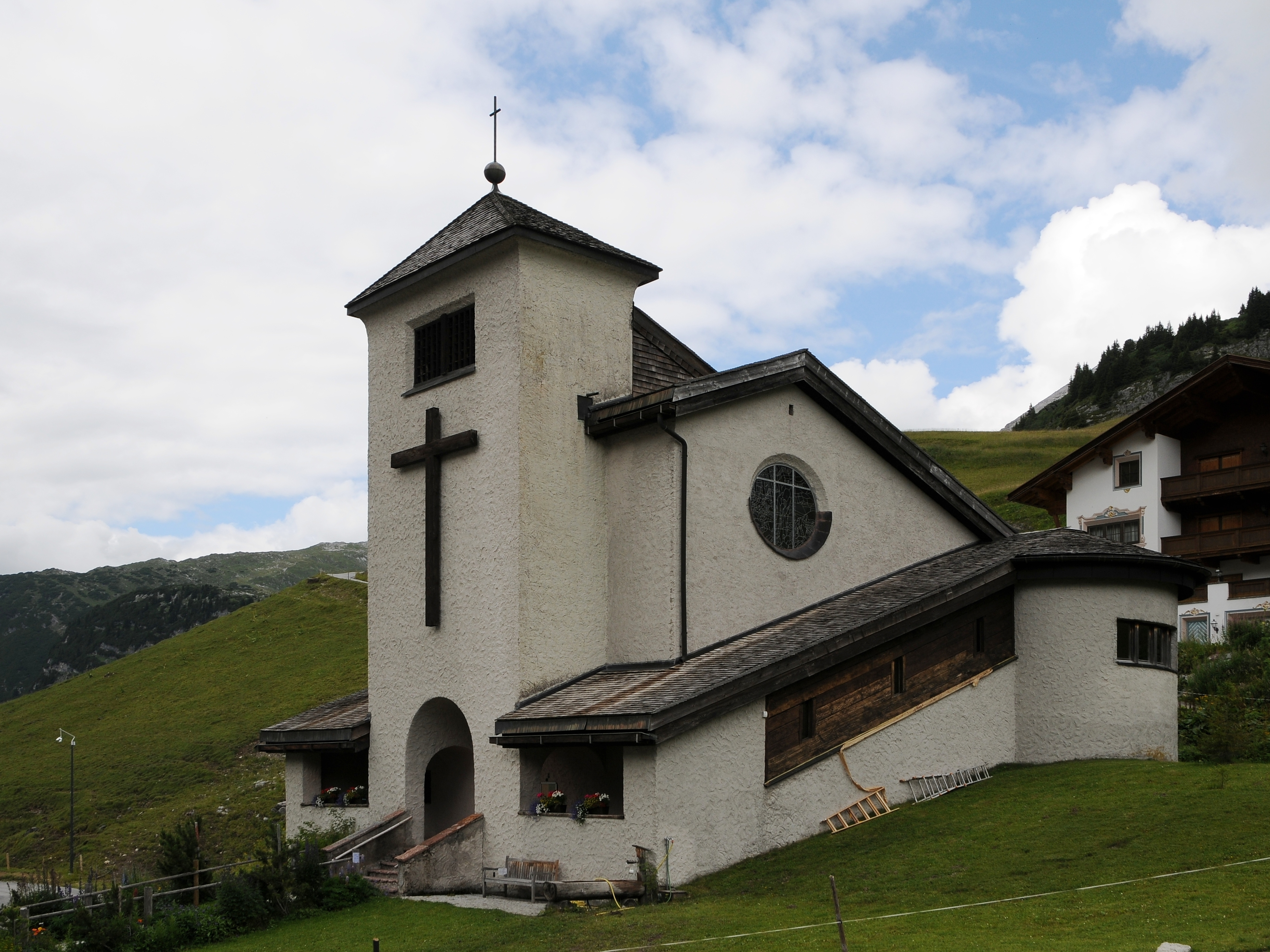 Kirche Christkönig, in Zürs am Arlberg, im Osten des Hoteldorfes. 1935/36 nach Plan von Hans Feßler erbaut. Rechteckbau mit mächtigem vorspringendem Turm und seitlicher Aufgang mit Rundbau.